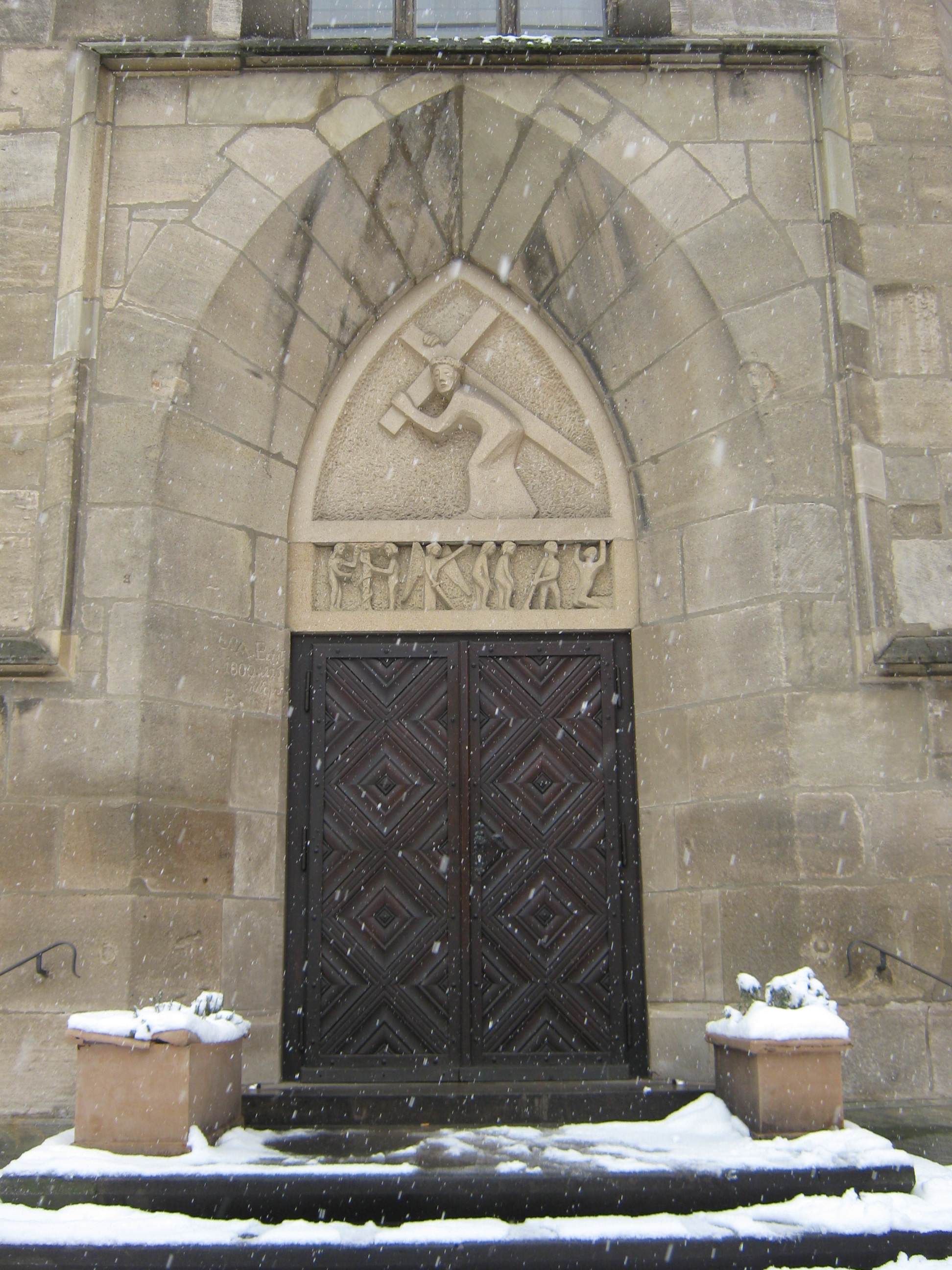 Nikolaikirche Reutlingen Westportal. Die Plastik im Tympanon des Westportals stammt von Ulrich Henn.